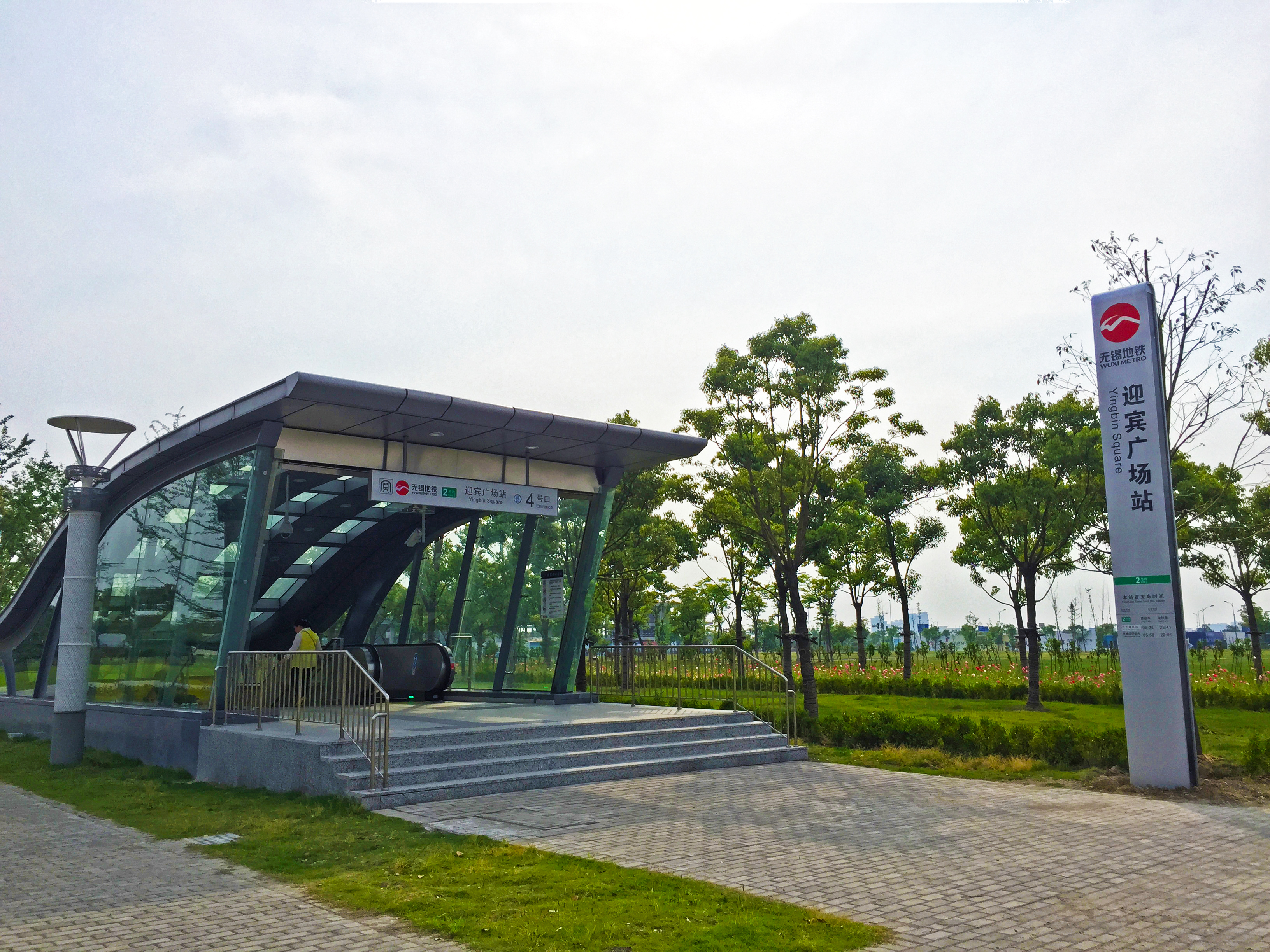 無錫地鐵2號線迎賓廣場站